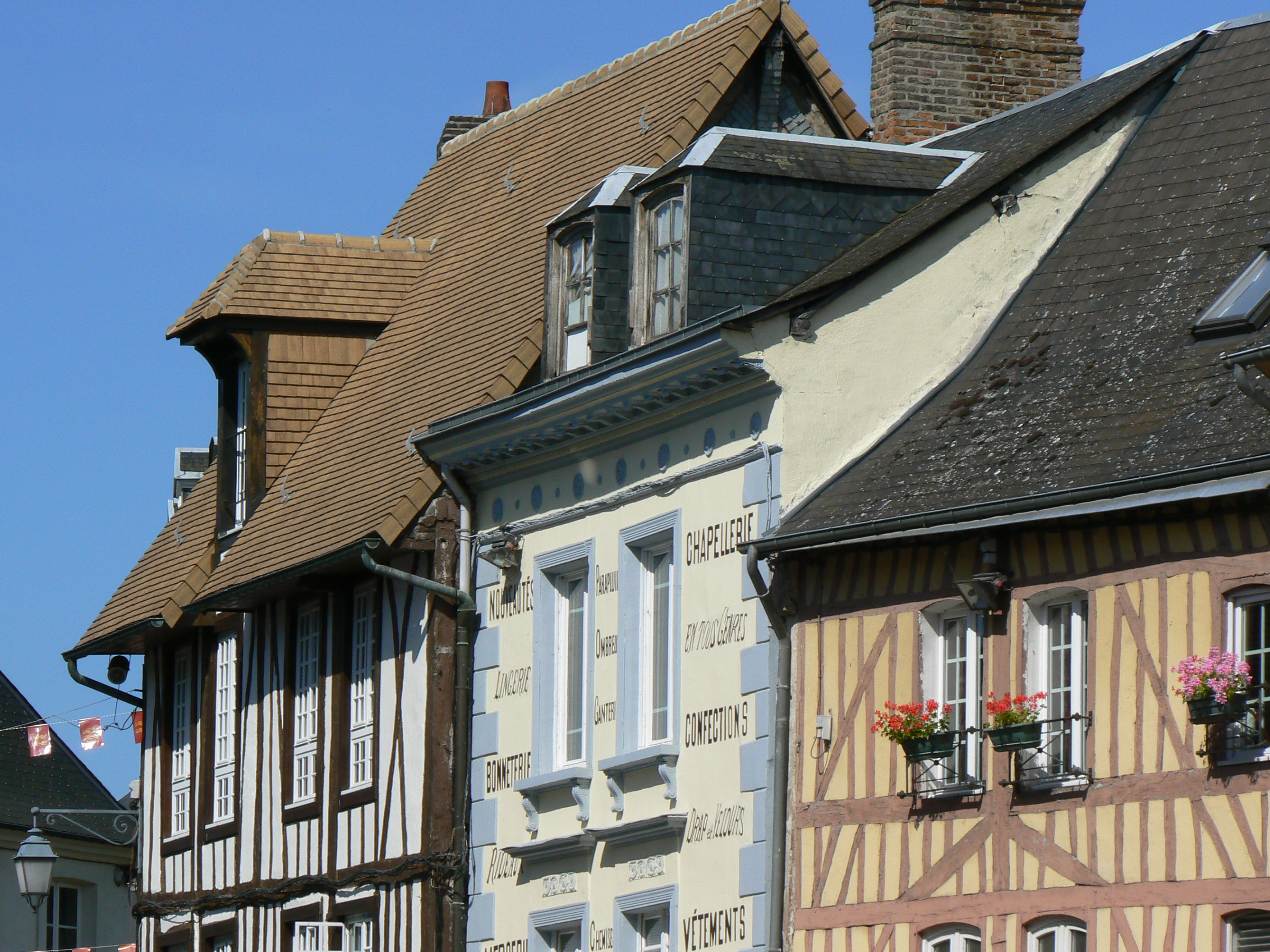 Détail de façades à pans de bois du centre-ville de Pont-de-l'Arche.